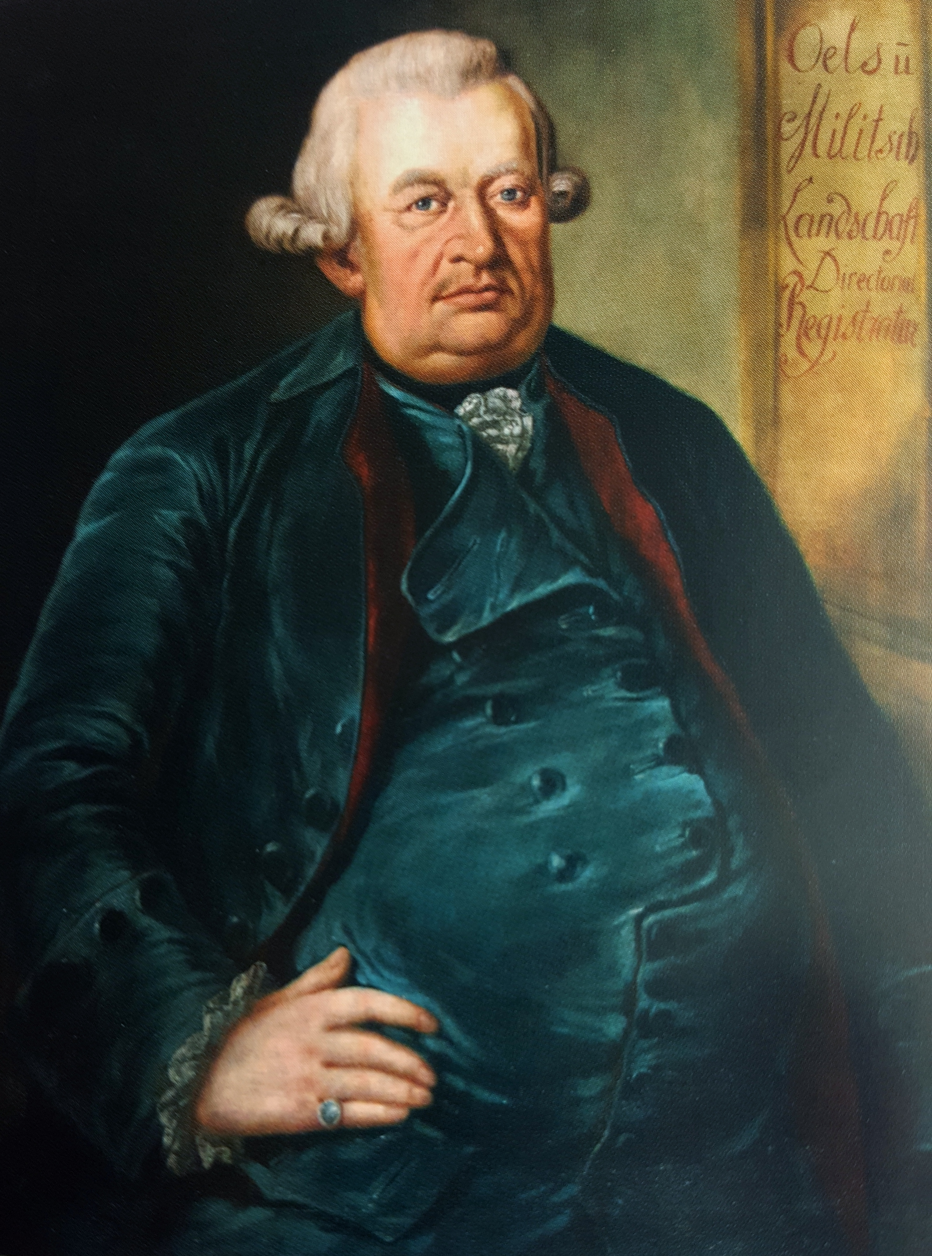 Isaak Braband, "Portret Ludwiga von Korkwitz", 1775, 90x71 Muzeum Narodowe we Wrocławiu.